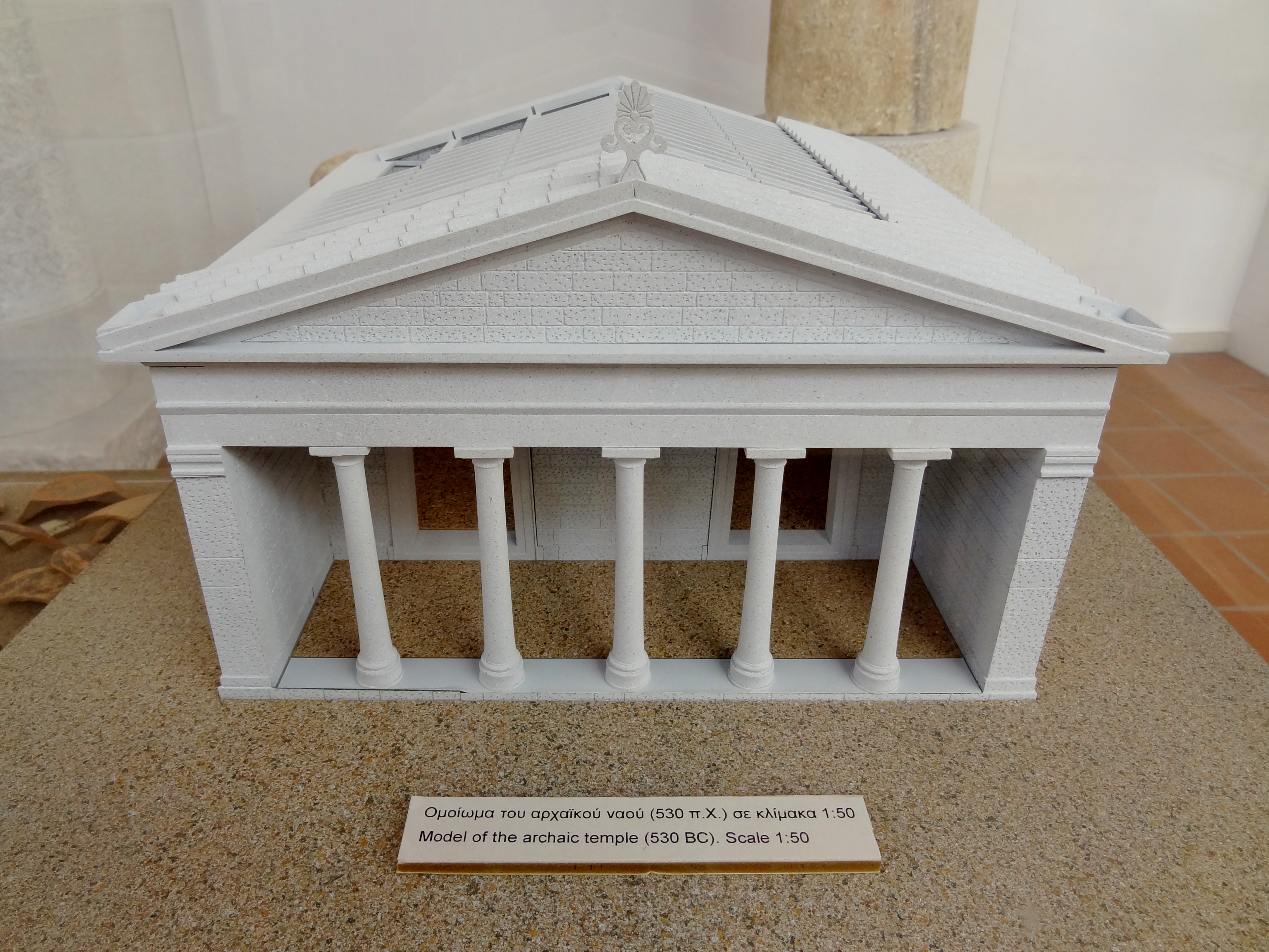 Modell des archaischen Tempels von Gyroulas im Archäologischen Museum von Gyroulas bei Ano Sangri auf Naxos, Kykladen, Griechenland